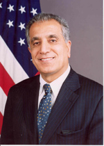 Zalmay Khalilzad as U.S. Ambassador to Iraq.